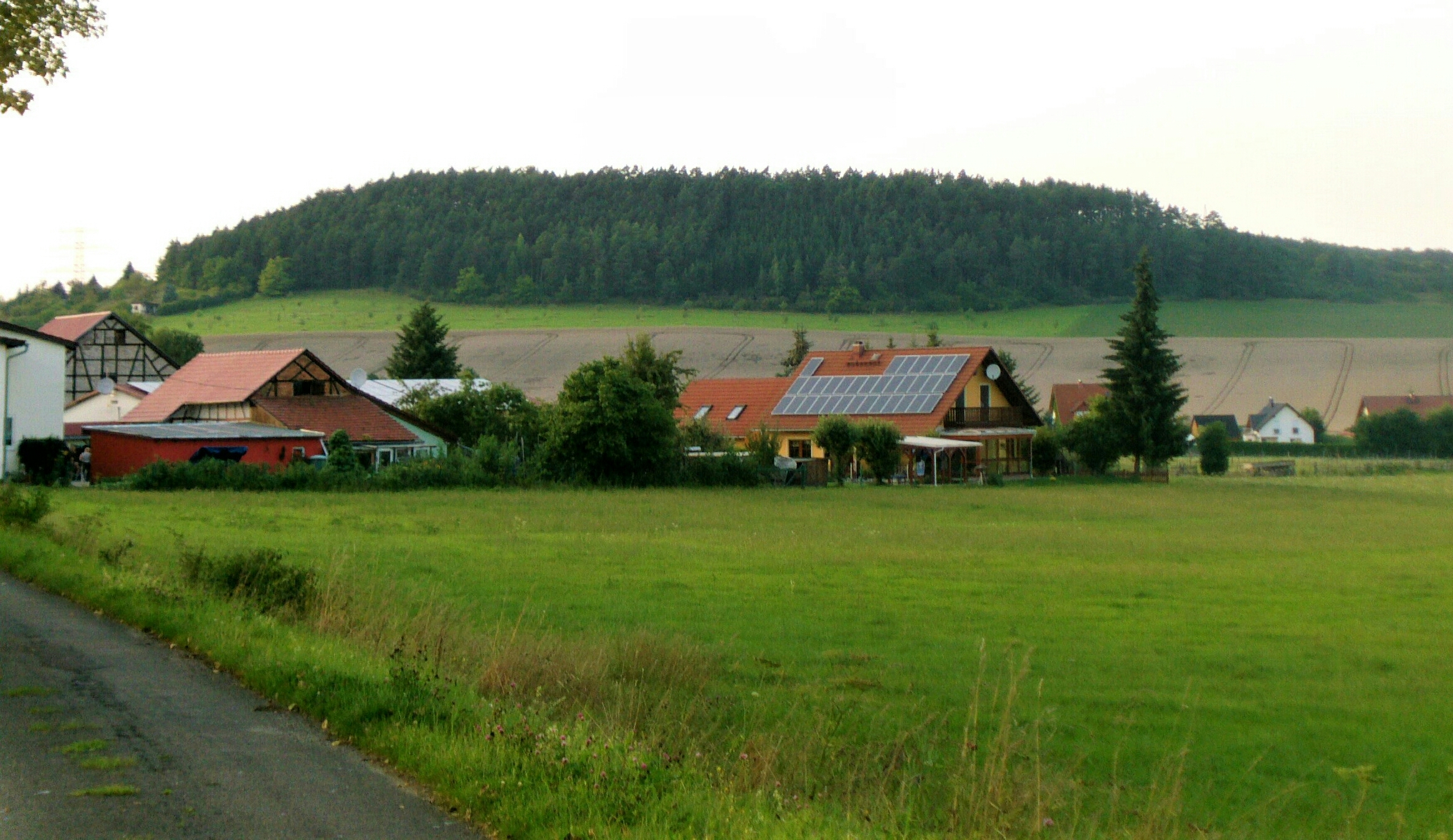 Der Traßdorfer Berg (490m) im Ilmkreis/TH